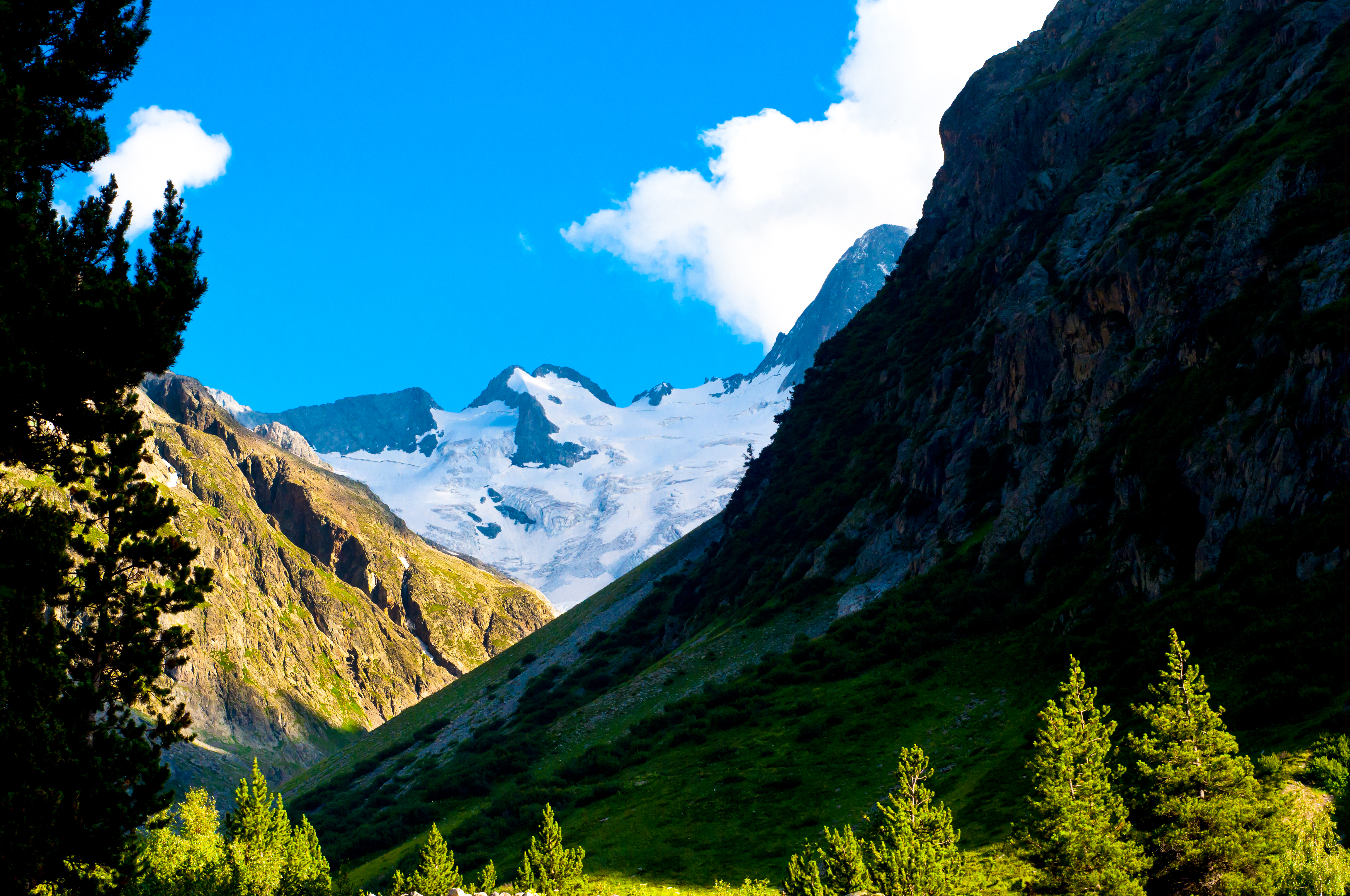 Vallée de la Pilatte avec en fond Les Bans